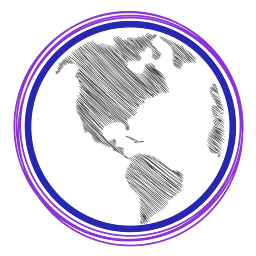 Logo Diseasemaps